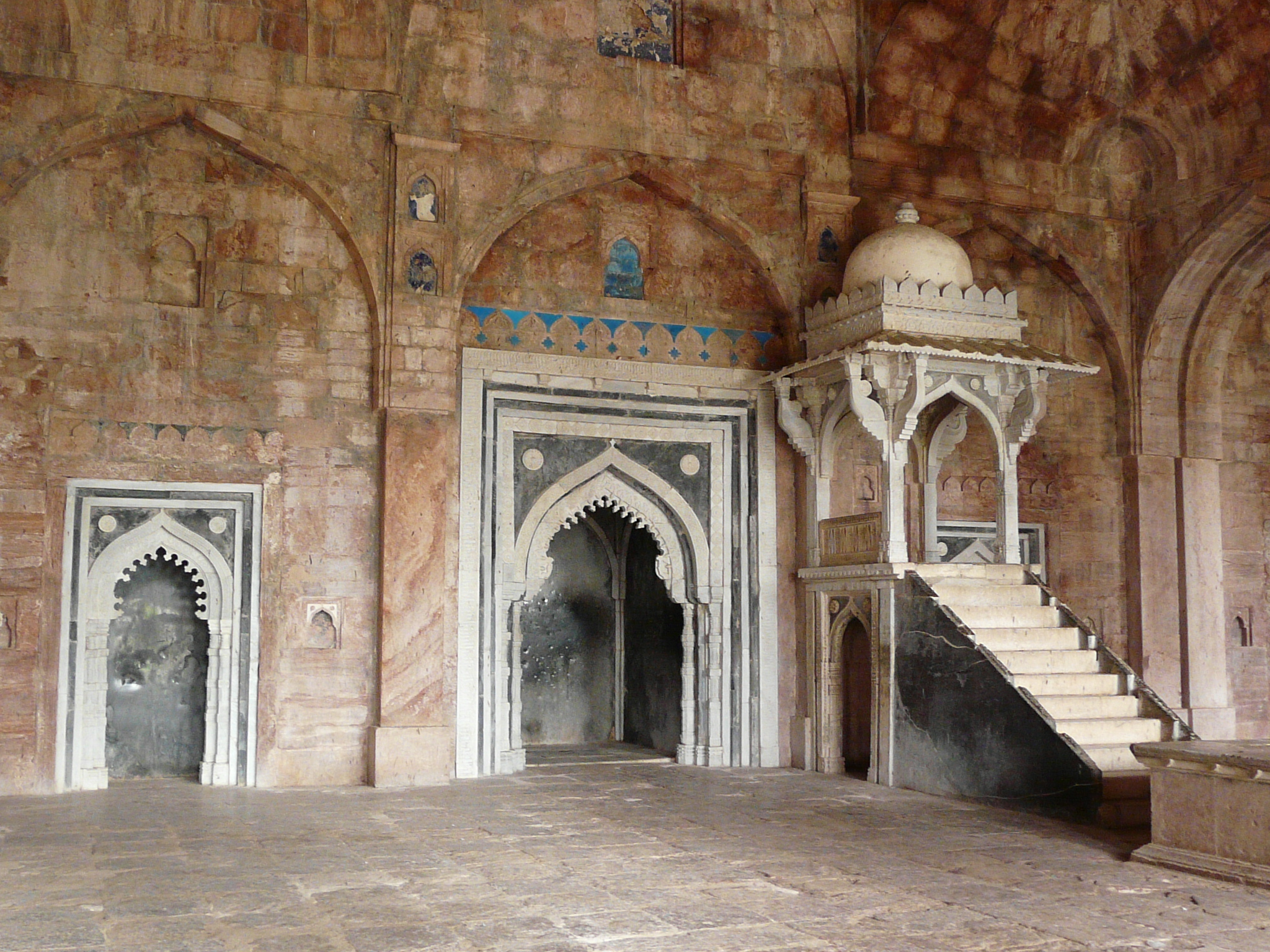 Mihrab and minbar Jama Masjid, Mandu, Madhya Pradesh, India